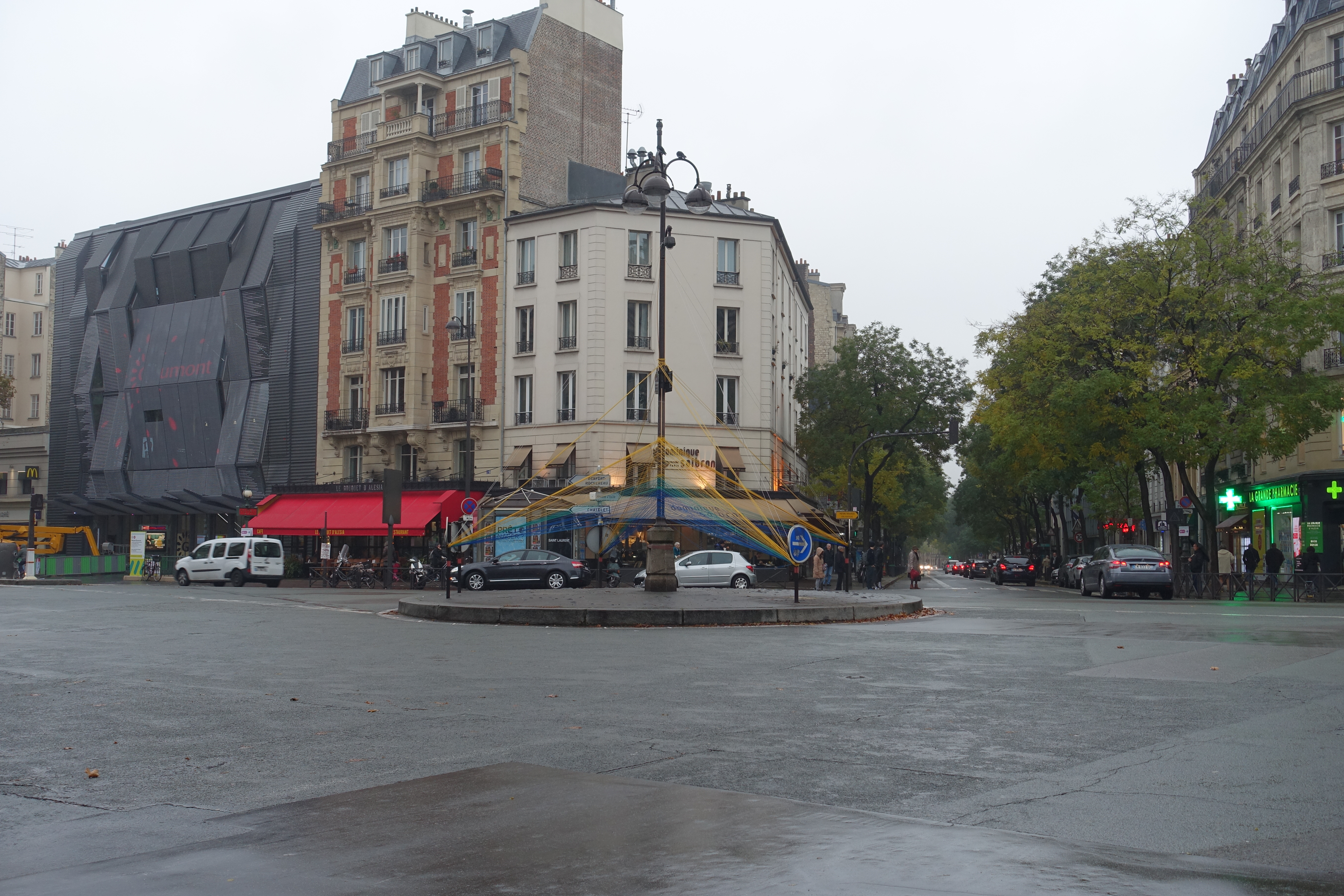 Place Victor Et Héléne Basch @ Paris